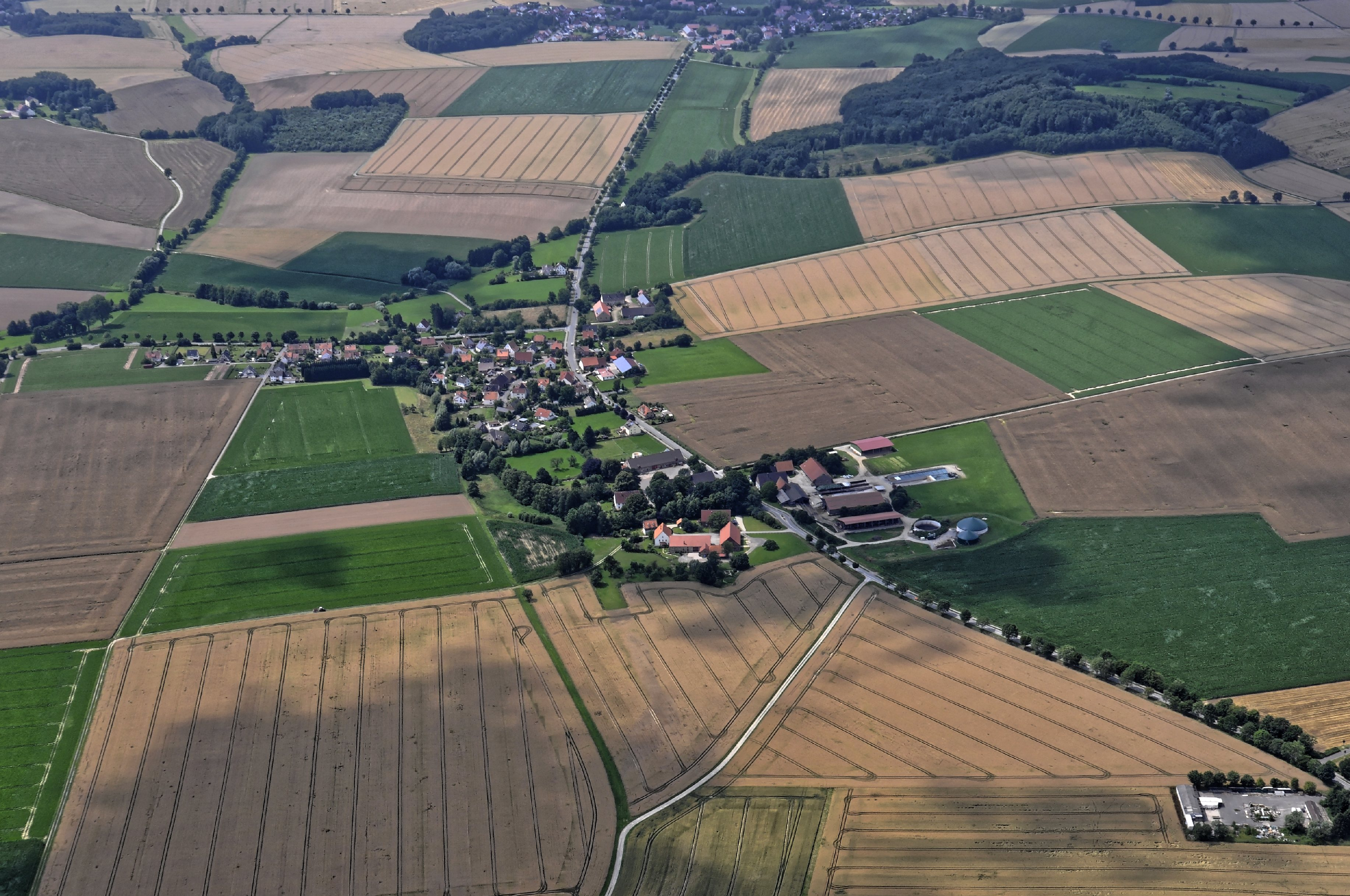 Bilder vom Flug Nordholz-Hammelburg 2015: Wellentrup